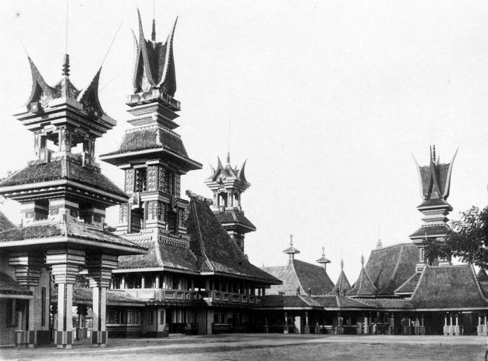 Repronegatief. Frontaanzicht van de jaarmarkt 'Pasar Gambir' 1934 te Jakarta, Java